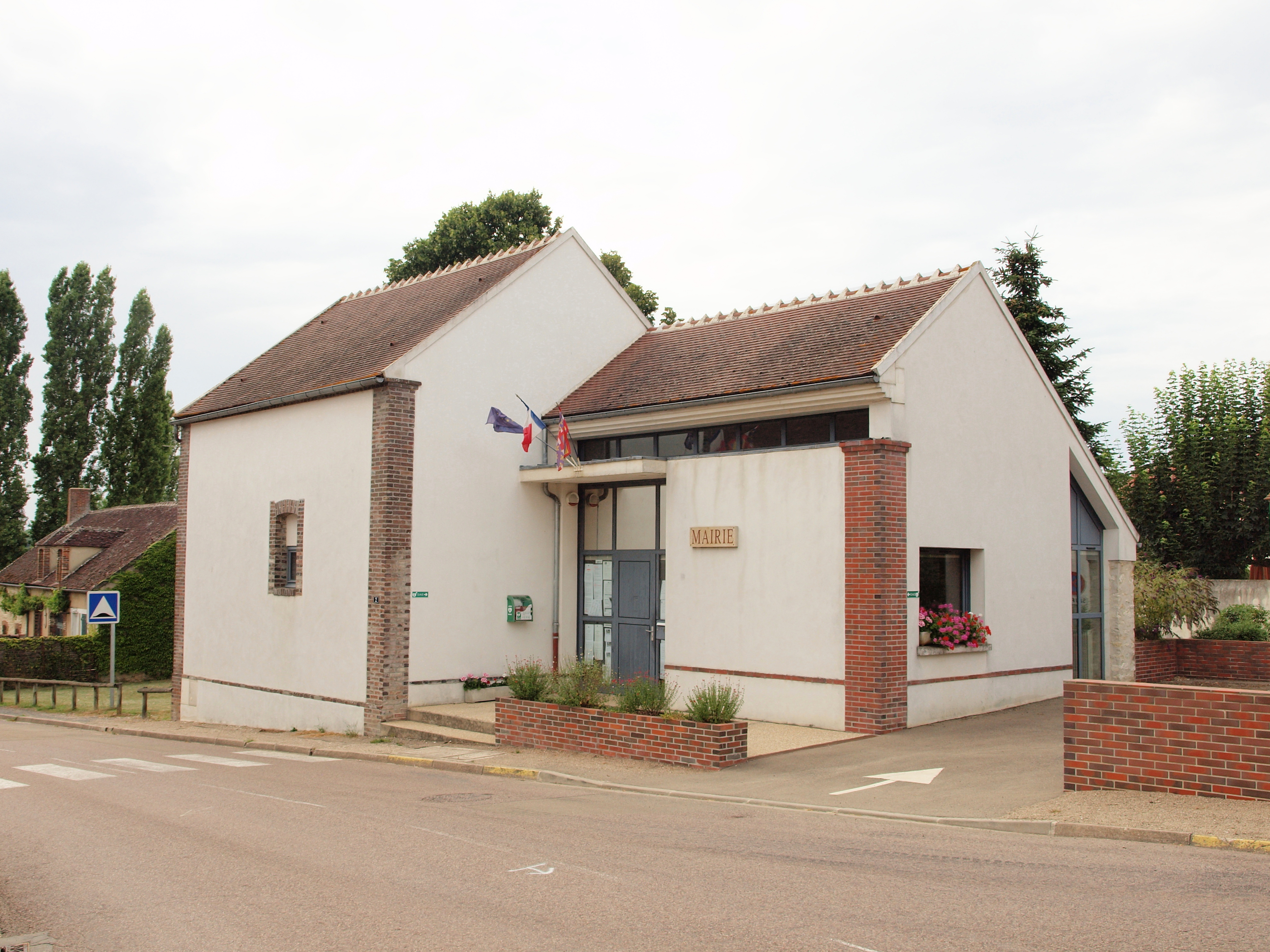 Branches (Yonne, France)